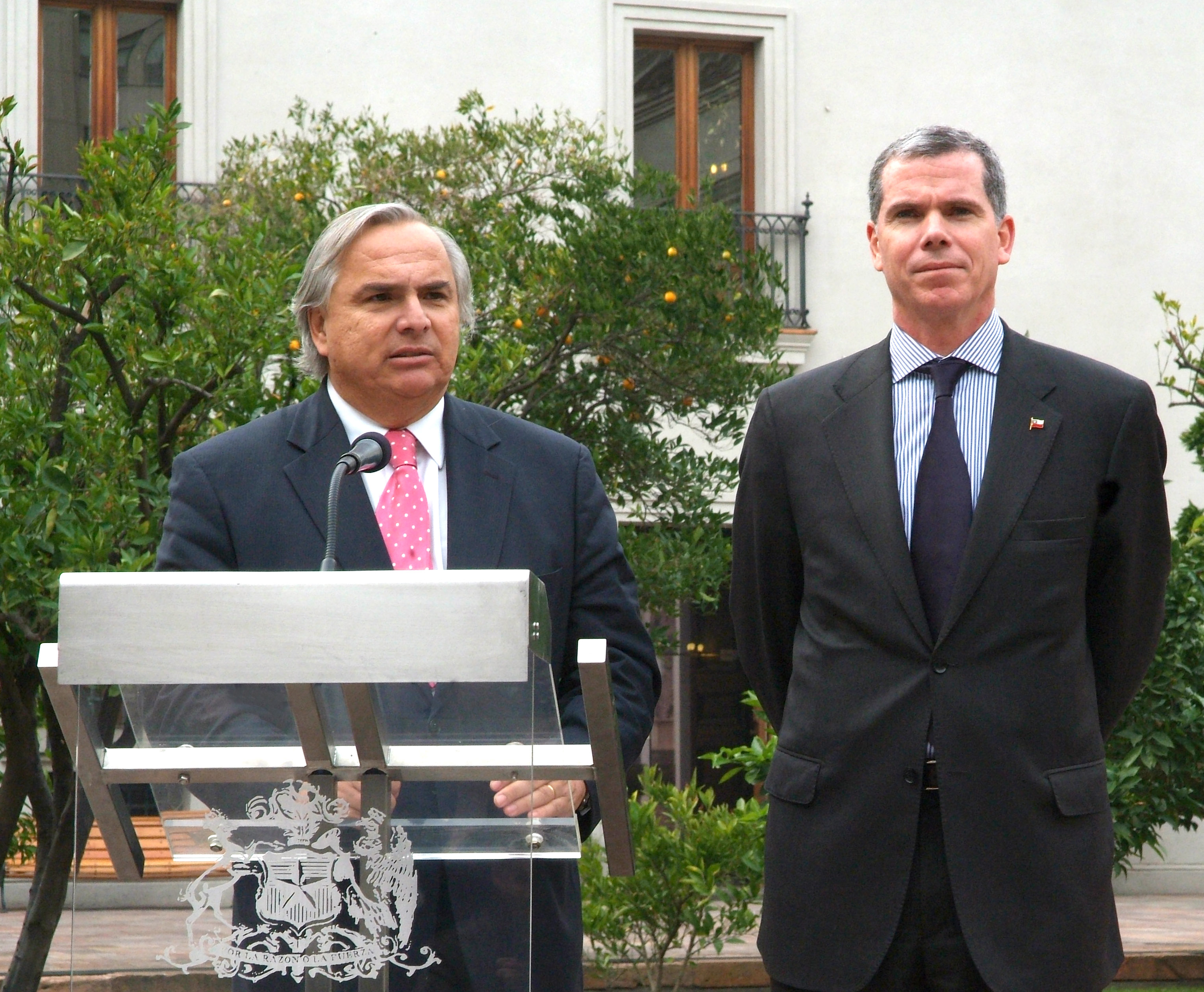 El Ministro Secretario General de Gobierno de Chile, Andrés Chadwick, junto al Ministro de Educación, Felipe Bulnes en el Palacio de La Moneda.